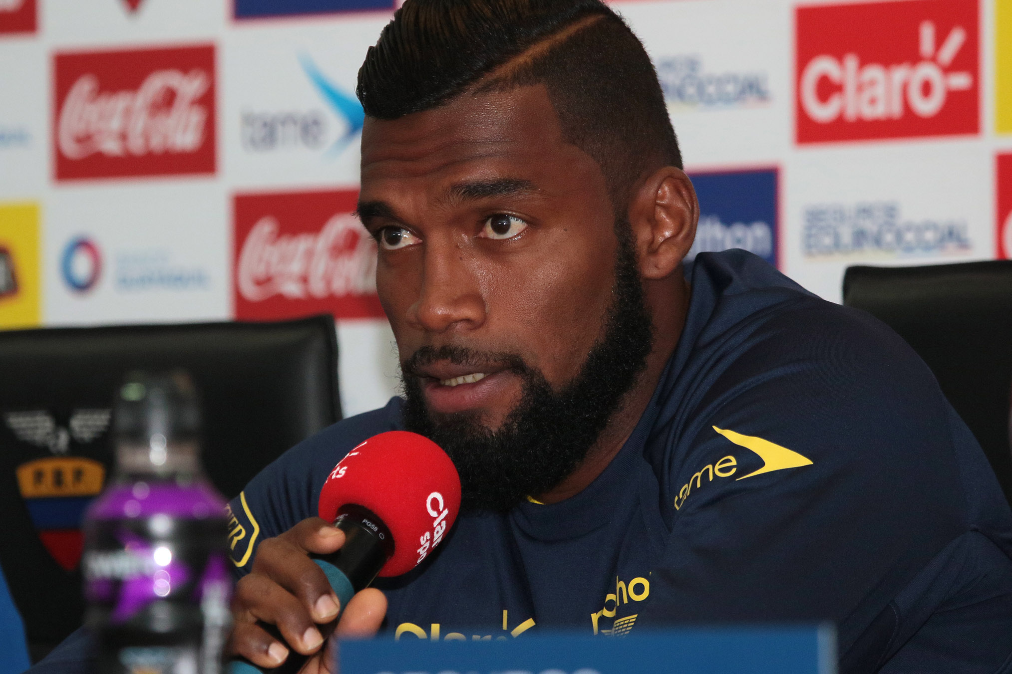 Quito, 08 Nov (Andes).- La selección ecuatoriana de fútbol cumplió con su segundo entrenamiento de cara a los partidos por eliminatorias para el mundial Russia 2018 ante Uruguay y Venezuela. Fotografías: Carlos Rodríguez/Andes